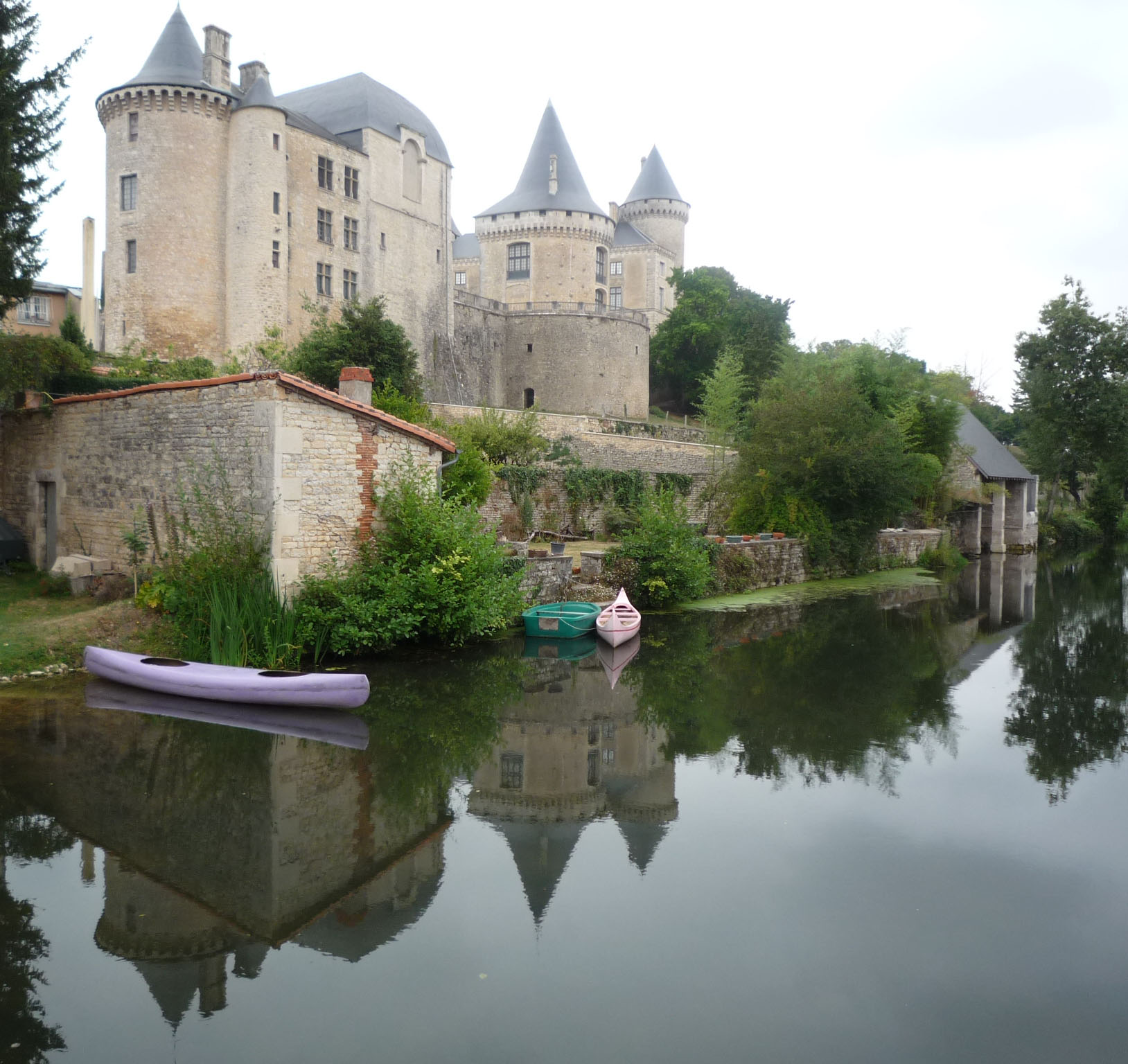 Verteuil-sur-Charente Chateau